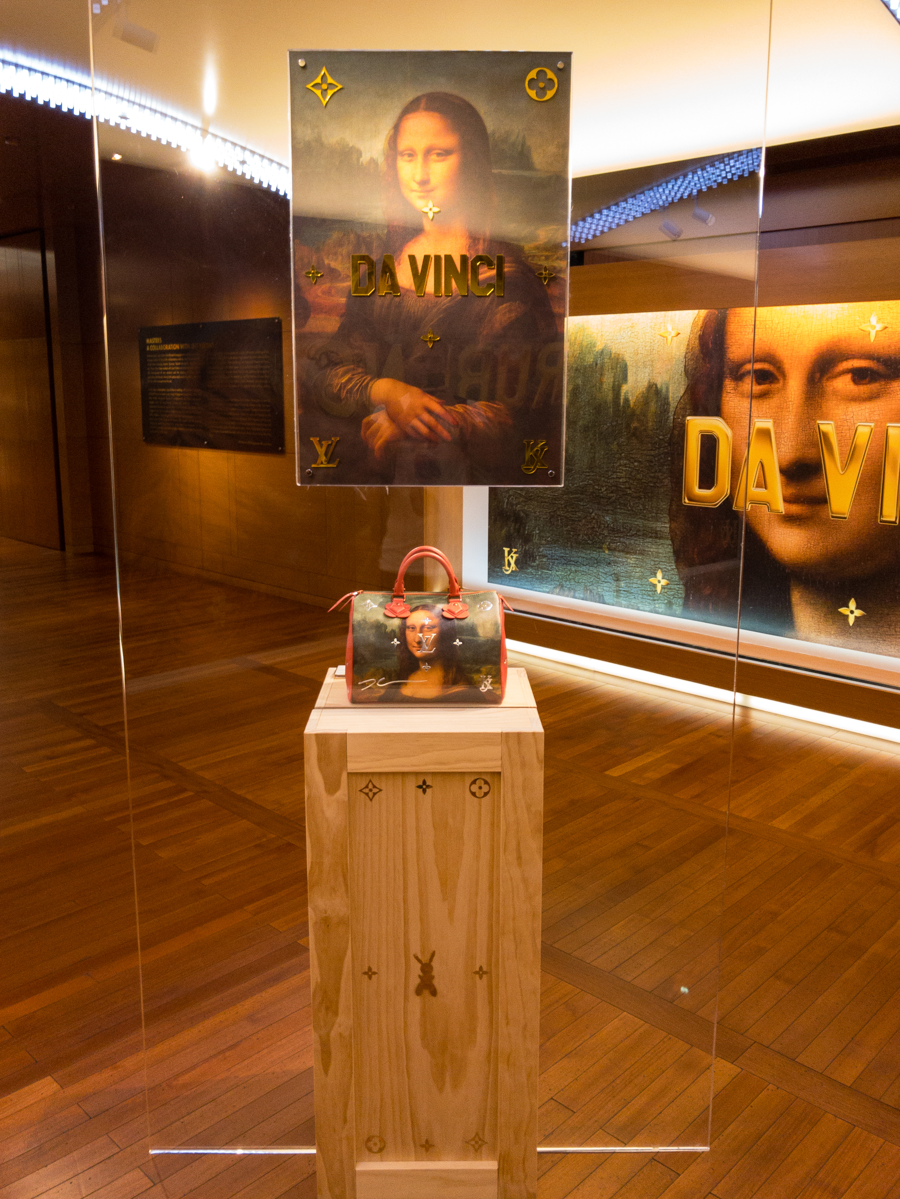 Louis Vuitton purse Da Vinci edition Singapur